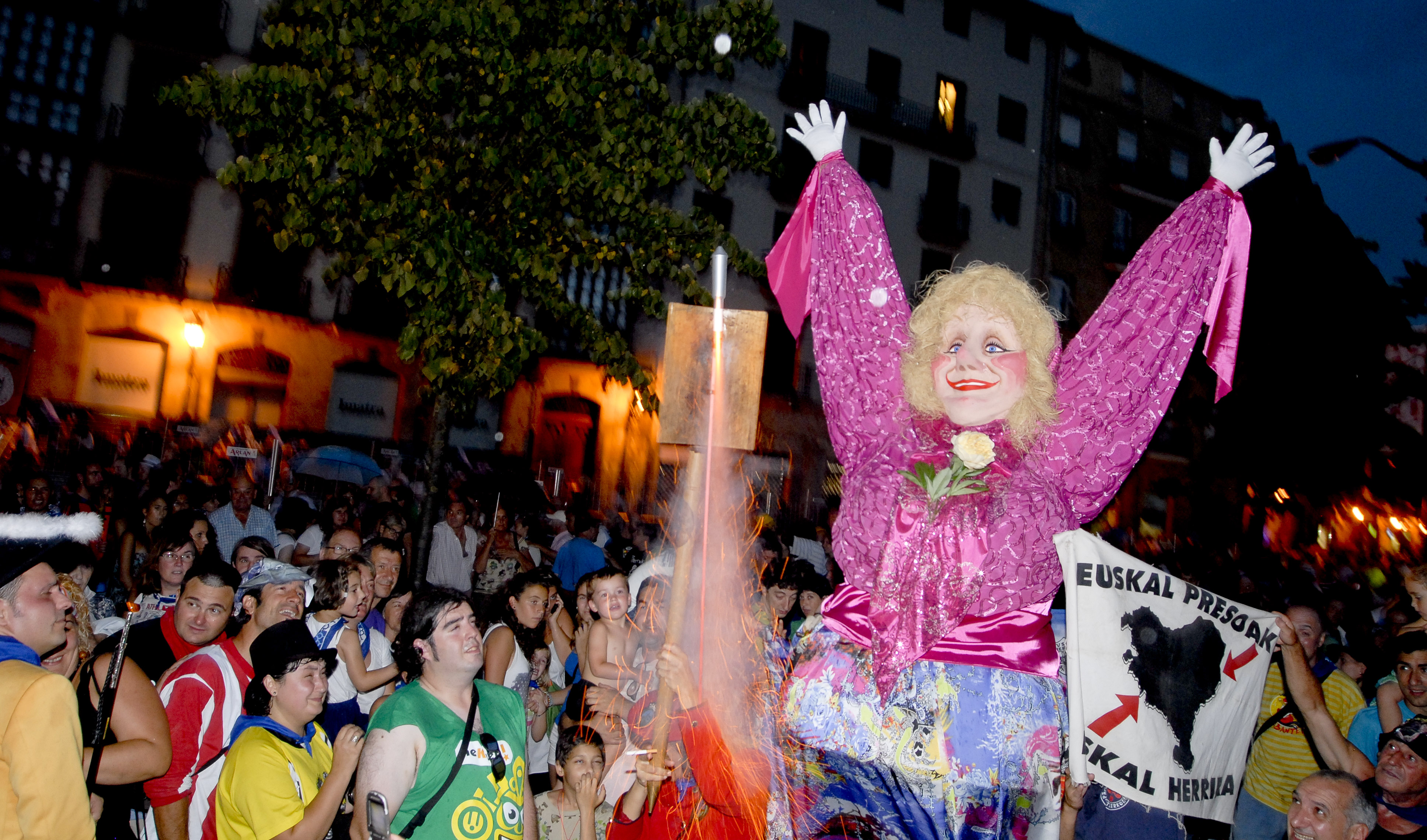 Larunbata20-103